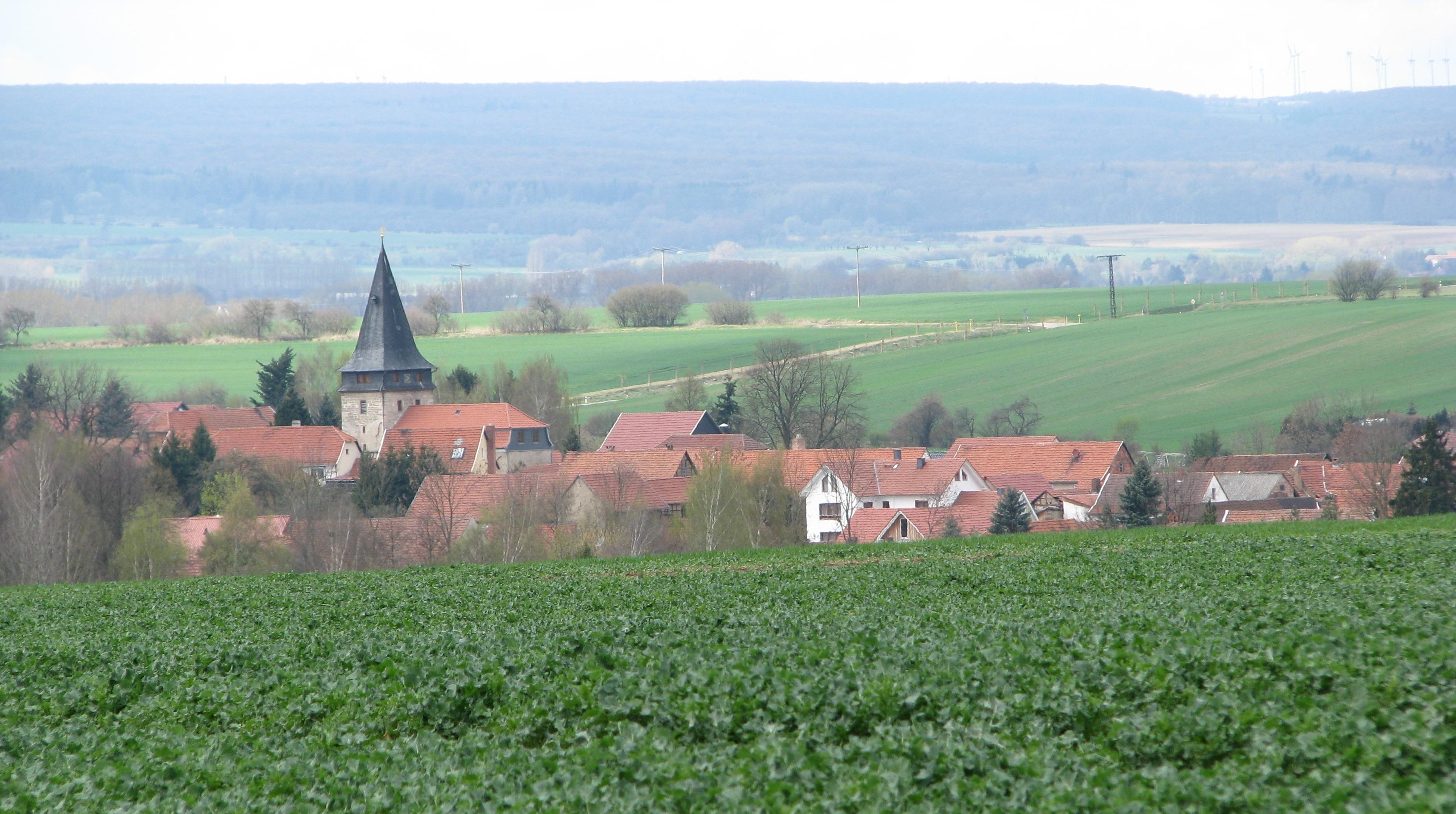 Flarchheim von Südosten. Zu erkennen ist der Turm der Andreaskirche. Im Hintergrund der nördliche Hainich am Übergang zum Oberen Eichsfeld (mit Windpark Büttstedt).